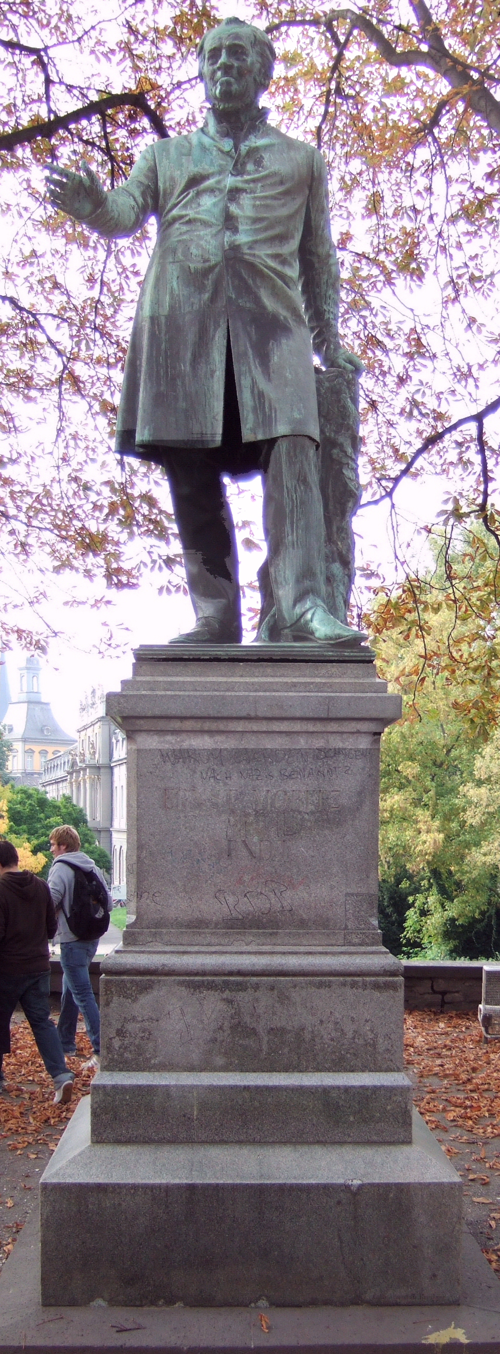 Bernhard Afinger: Ernst Moritz Arndt-Denkmal - Bonn (Alter Zoll) „Auf einer rechteckigen Sandsteinplatte erhebt sich ein vierstufiger Marmorpfeiler, der nach oben hin schmaler wird. Auf diesem Unterbau steht, einen Fuß vorgestellt und mit einer Hand zum Rhein deutend, das eherne Standbild Ernst Moritz Arndts. Aufgestellt am 21./22: Juli 1865, enthüllt am 29. Juli 1865, neu aufgestellt am 2. März 1950 und neu eingeweiht am 22. März 1951, erinnert das Denkmal an den deutschen Dichter und Professor an der Universität Bonn, Ernst Moritz Arndt... Ernst Moritz Arndt ist als überlebensgroßer Mann gegeben, er trägt einen schlichten Rock und wirkt lebendig und einfach. Die Haltung von Stand- und Spielbein sowie der erhobene Arm lockern das Statuarische etwas auf. Der Kopf weist porträthafte Züge auf. Flankiert wird die Figur Arndts von einem Baumstumpf, der frische Triebe zeigt - Symbol für die Lebenskraft Deutschlands. Die Sockelinschriften am Denkmal unterstreichen die patriotische Prägung in Arndts Dichtung. Es sind Aussprüche von ihm, die sich auf die politischen Zustände seiner Zeit beziehen.“ (Der Oberstadtdirektor: Kunst im Bonner Stadtbild, 11/86) Inschriften: „Der Gott, der Eisen wachsen ließ, der wollte keine Knechte“ „Der Rhein - Deutschlands Strom, nicht Deutschlands Grenze.“ Material: Bronzeguss hergestellt von der Gießerei Georg Ferdinand Howaldt, Braunschweig